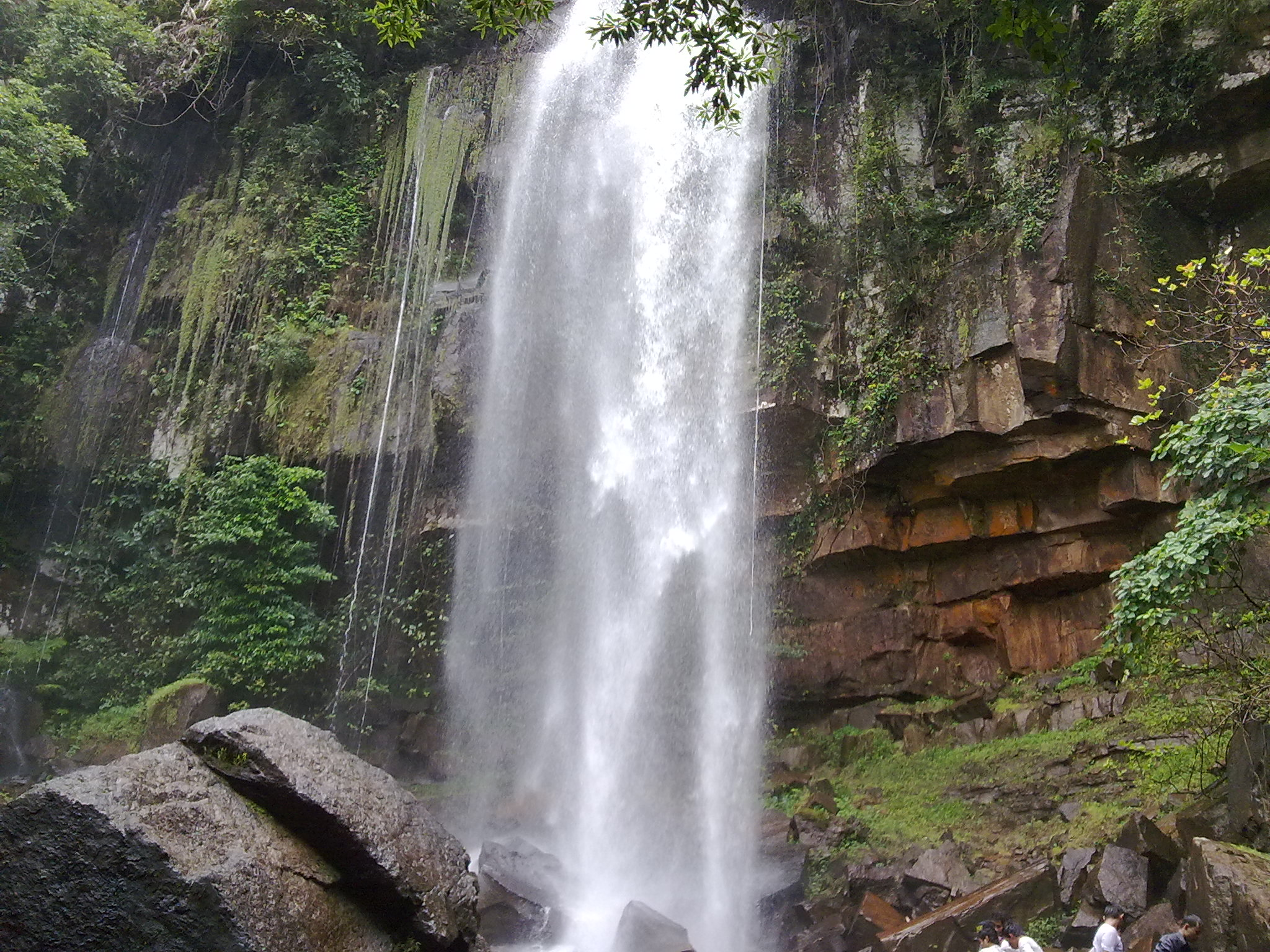 2 Chambak waterwall 21-11-2010